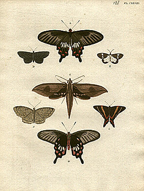 Plate from Papillons Exotiques des Trois parties du Monde: l'Asie, l'Afrique et l'Amerique Amsterdam, 1779-91